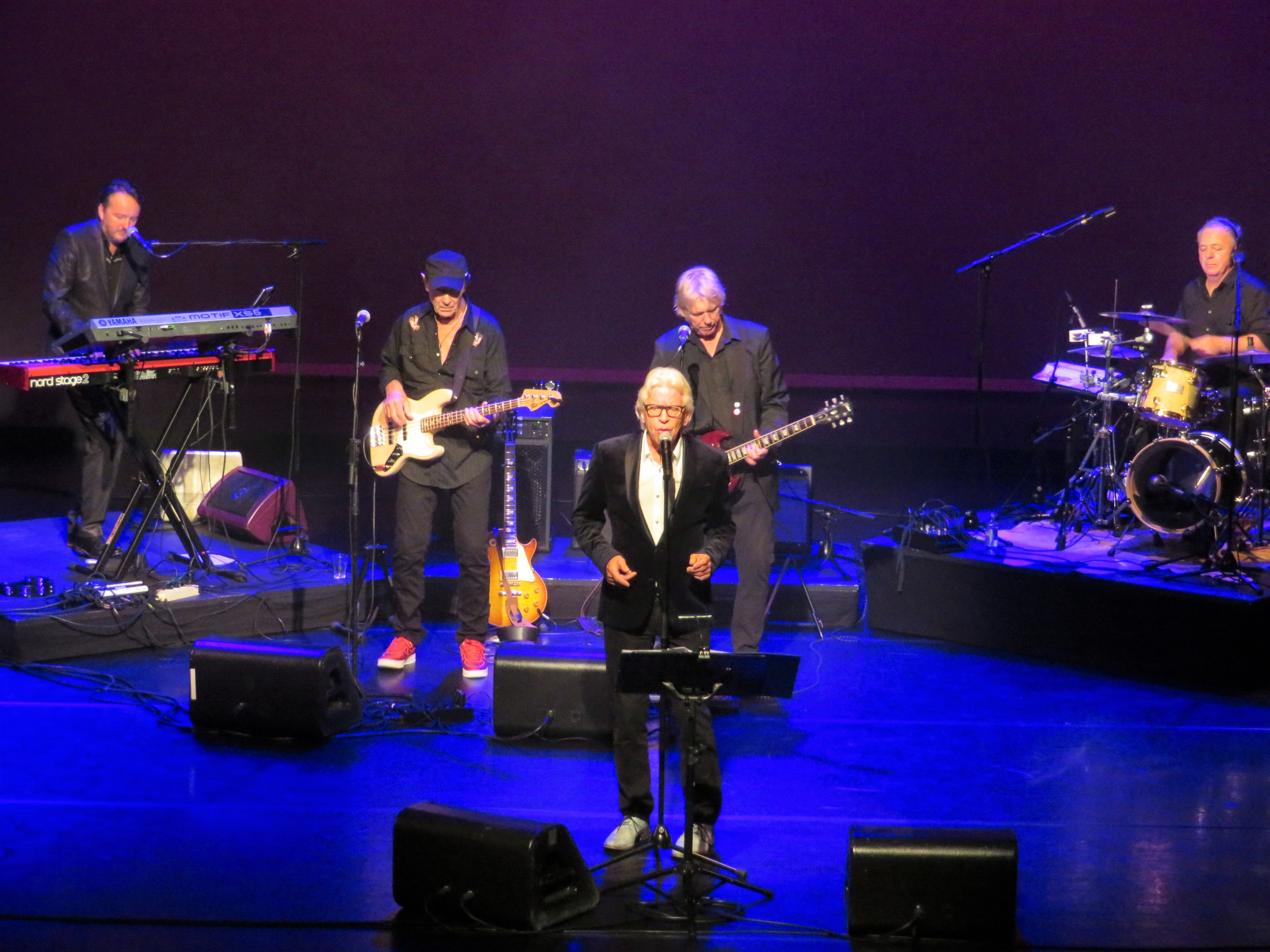 Rudy Bennett met The New Motion (v.l.n.r. Pepe Everts, Polle Eduard, Alan McLachhlan en Ruud Saelman) bij de première van de theatershow "Rot op met die Geraniums" in de Schouwburg Amstelveen op 13 oktober 2018